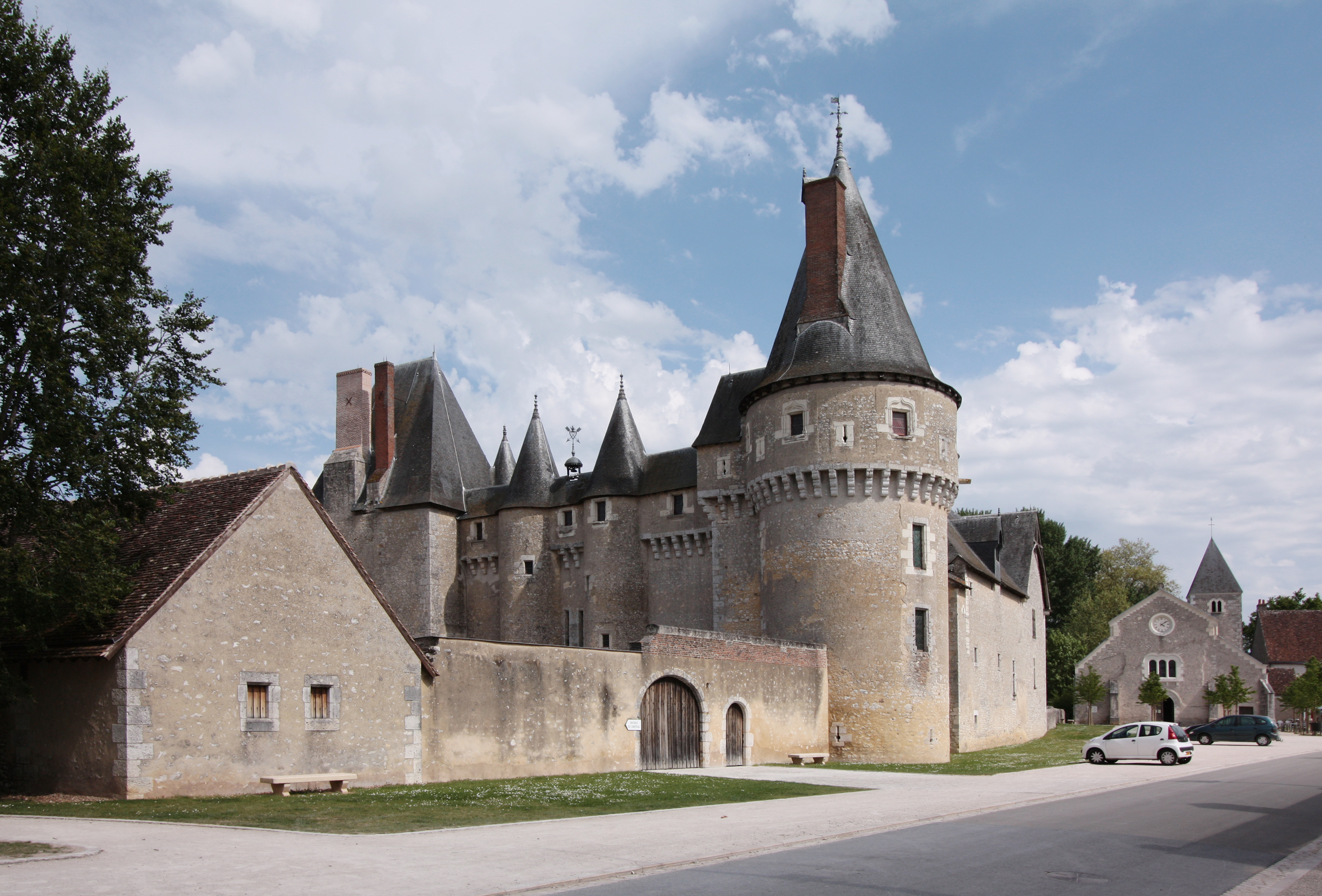 Schloss Fougères-sur-Bièvre in der Ortschaft Fougères-sur-Bièvre im Département Loir-et-Cher/Frankreich